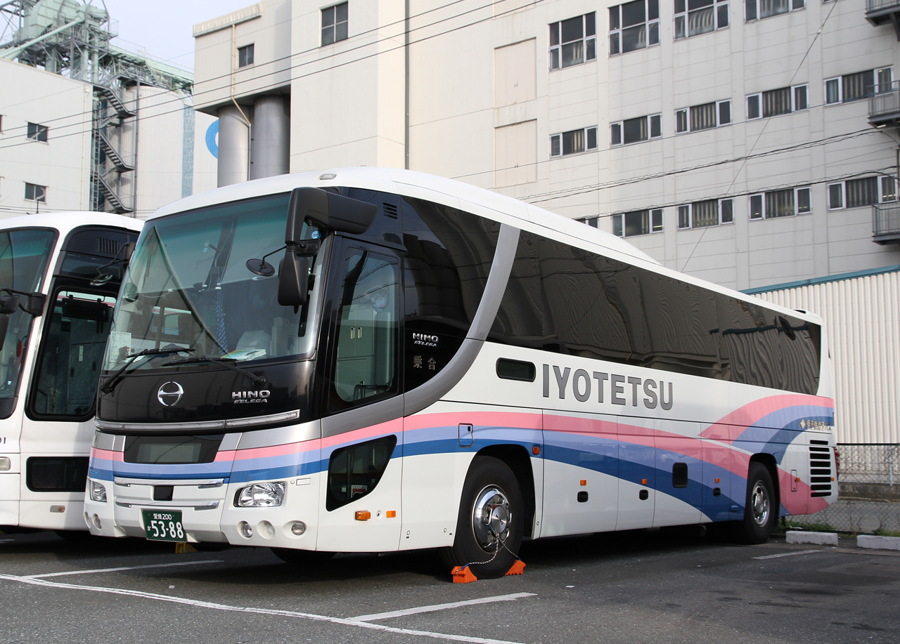 登録番号 愛媛200か53-88 社番：5388 伊予鉄南予バス㈱本社営業所（八幡浜）所属 夜行高速路線用車両 2015年4月18日 西鉄高速バス㈱福岡支社にて許可を得て撮影 撮影者 Zondag2000